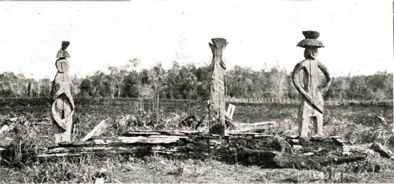 Cementerio Mapuche a comienzos del siglo XX.